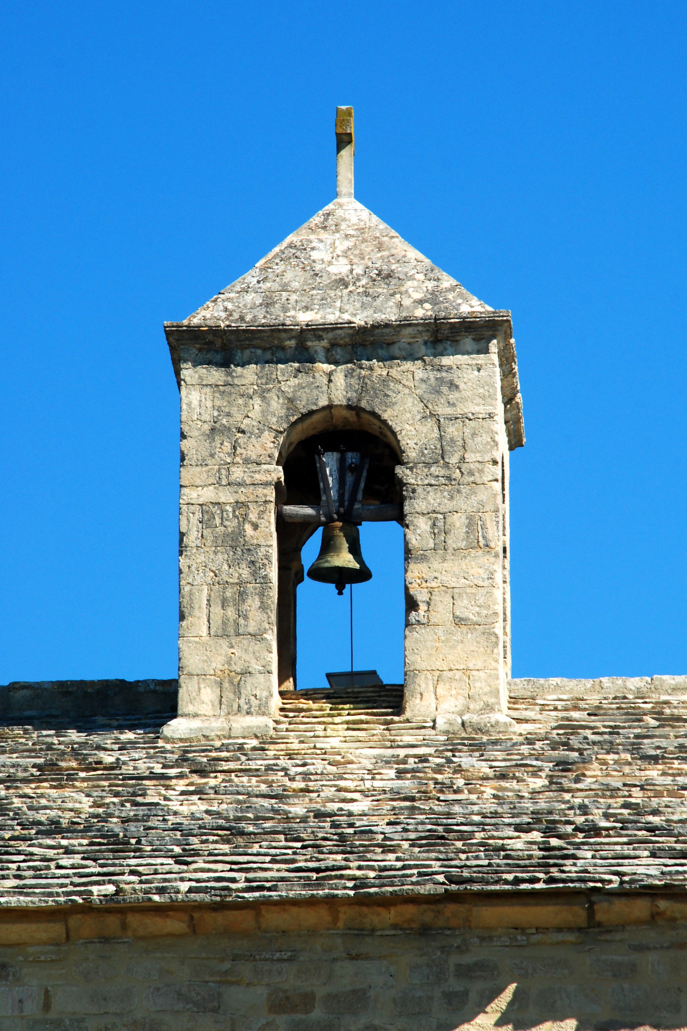 France - Gard - Tresques - Église Saint-Martin-de-Jussan .